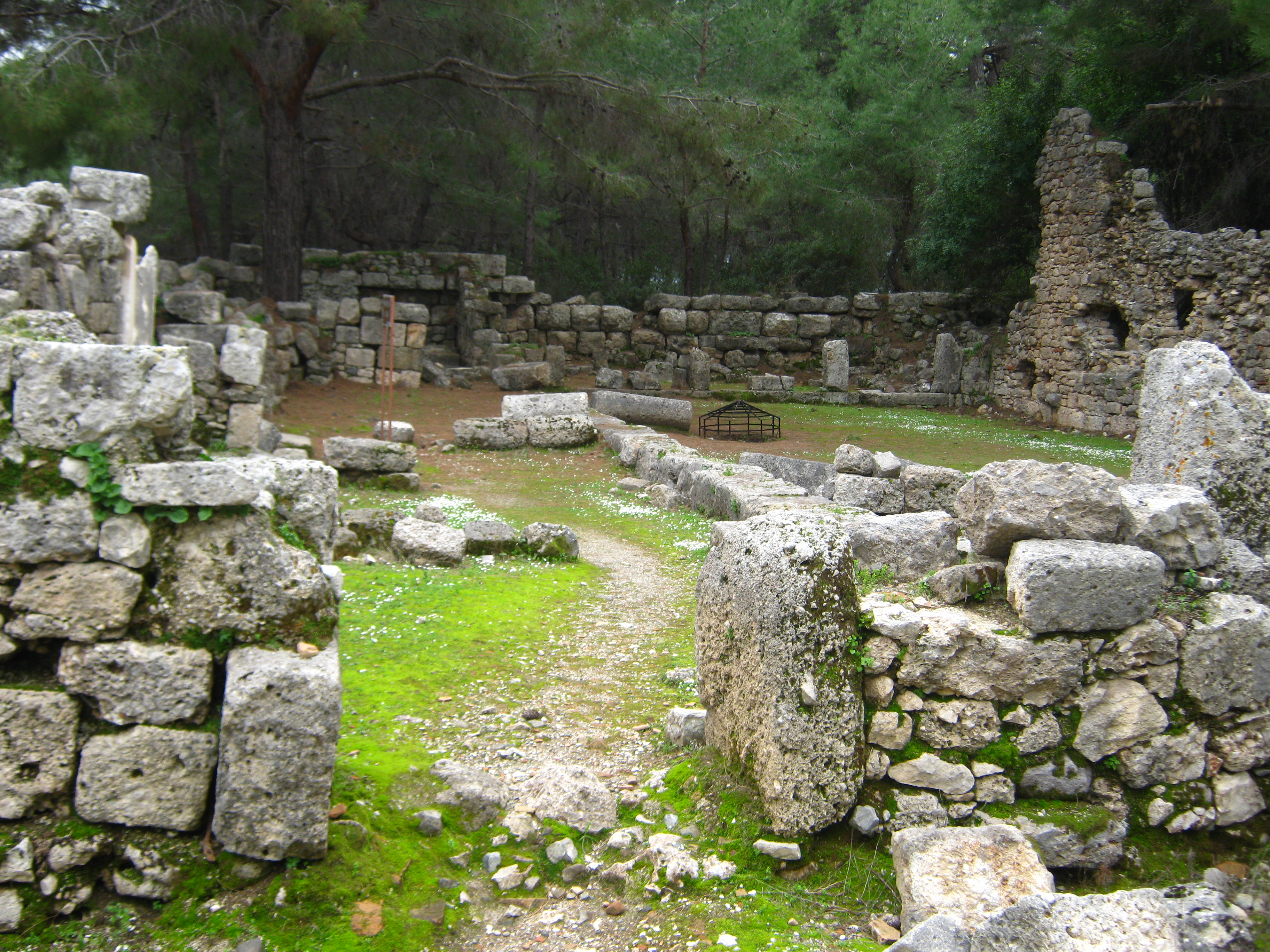 Фаселіс. "Квадратна агора"